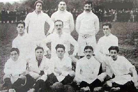 Joueurs de l'OM en 1911.